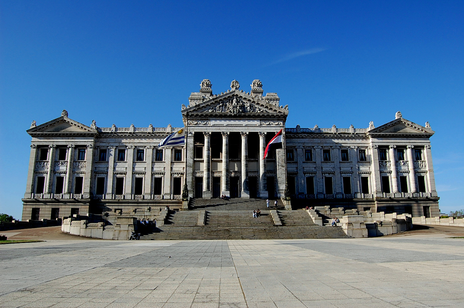 Palacio Legislativo. Ubicada en el departamento de Montevideo